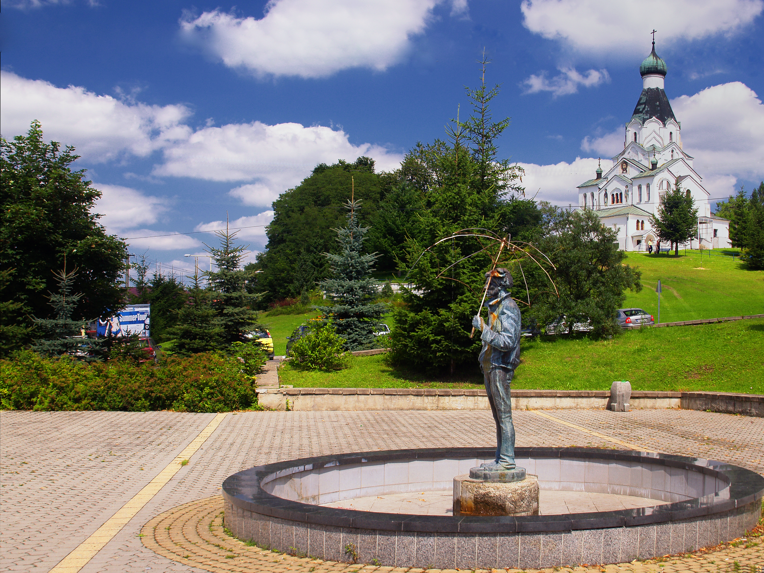 Medzilaborce - Andy Wahrol